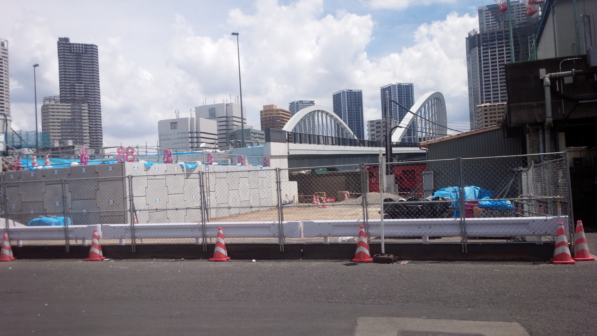 築地市場内で工事がストップしている築地大橋. The file name is not 'under cunstraction' but 'under construction' :)